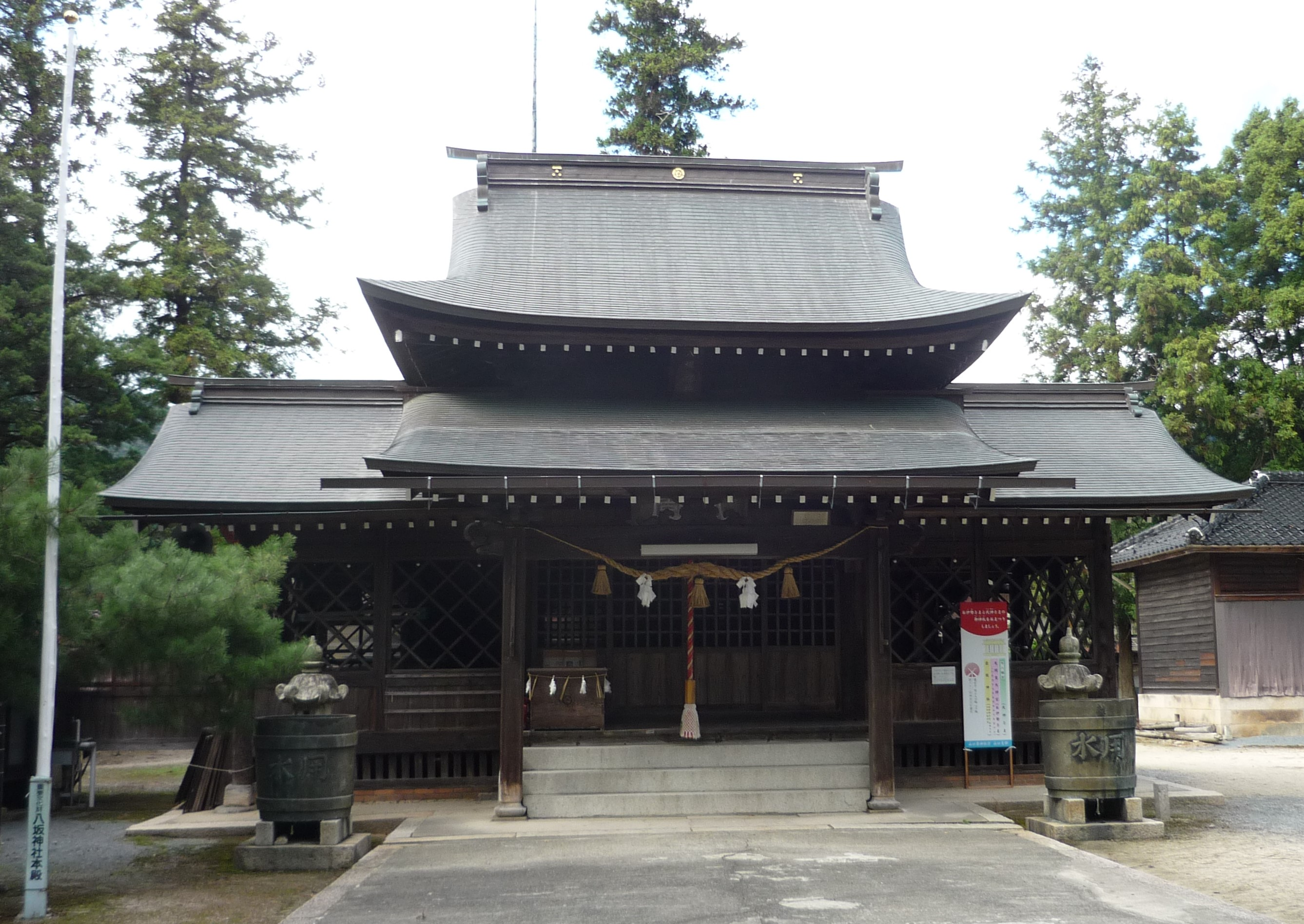 山口県山口市の八坂神社本殿（重要文化財）